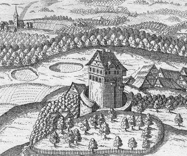 Röckenhof, ehem. Weiherschloss bei Kalchreuth, Landkreis Erlangen-Höchstadt